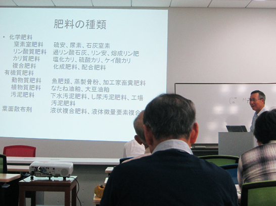 塾SiN講義風景